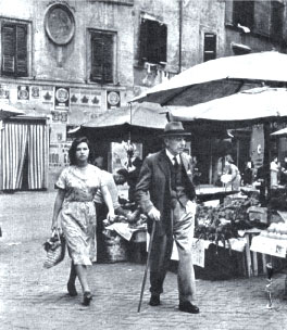 Irene Galter ed Aristide Baghetti in "Il sole negli occhi" (Pietrangeli, 1953)